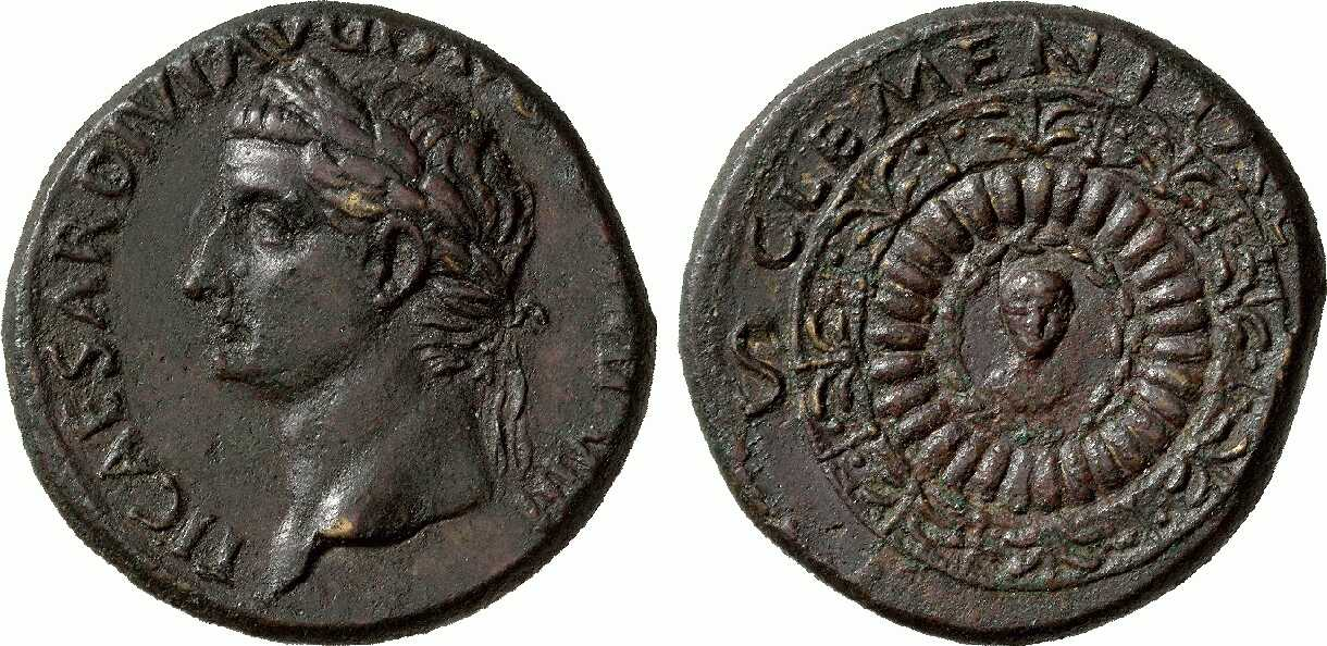 Dupondius, 34 - 35. TI · CAESAR · DIVI · AVG · F · AVGVST · IMP · VIII. Kopf des Tiberius mit Lorbeerkranz links. Rs: CLEMENTIAE / S - [C]. Runder Ehrenschild, im Zentrum eine drapierte, männliche Büste mit Lorbeerkranz en face, umgeben von einem Lorbeerkranz; darauf folgt ein Ring aus wulstartigen Erhebungen, während der äußere Rand mit Strich-, Punkt- und Palmettenmustern verziert ist. RIC 38. C. 4. BMC 85. CBN 127 (stempelgleich). MIR 46-5. 15,88 g. Selten. Feines Portrait, dunkle, rotbraune Patina mit kleinen Auflagen, vorzüglich. Aus D. Helbing Nachf., Auktion 49 (22. März 1926, München), Nr. 197, und aus Slg. W. Niggeler, Bank Leu AG - Münzen und Medaillen AG, Auktion 2. / 3. November 1967 (Basel), Nr. 1082, und aus Münzen und Medaillen AG, Auktion 52 (19. / 20. Juni 1975, Basel), Nr. 557.